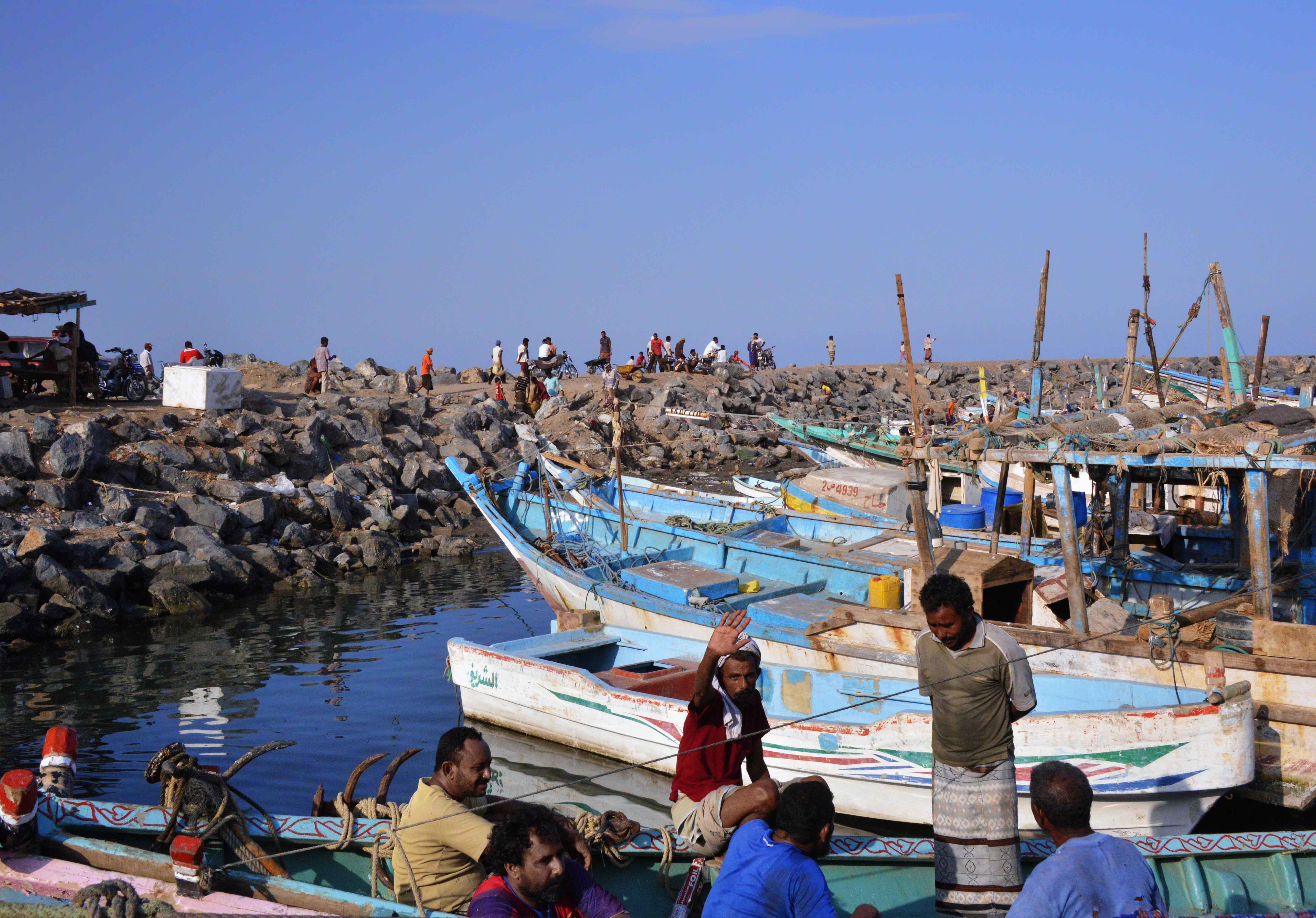 Breakwater, Yemen